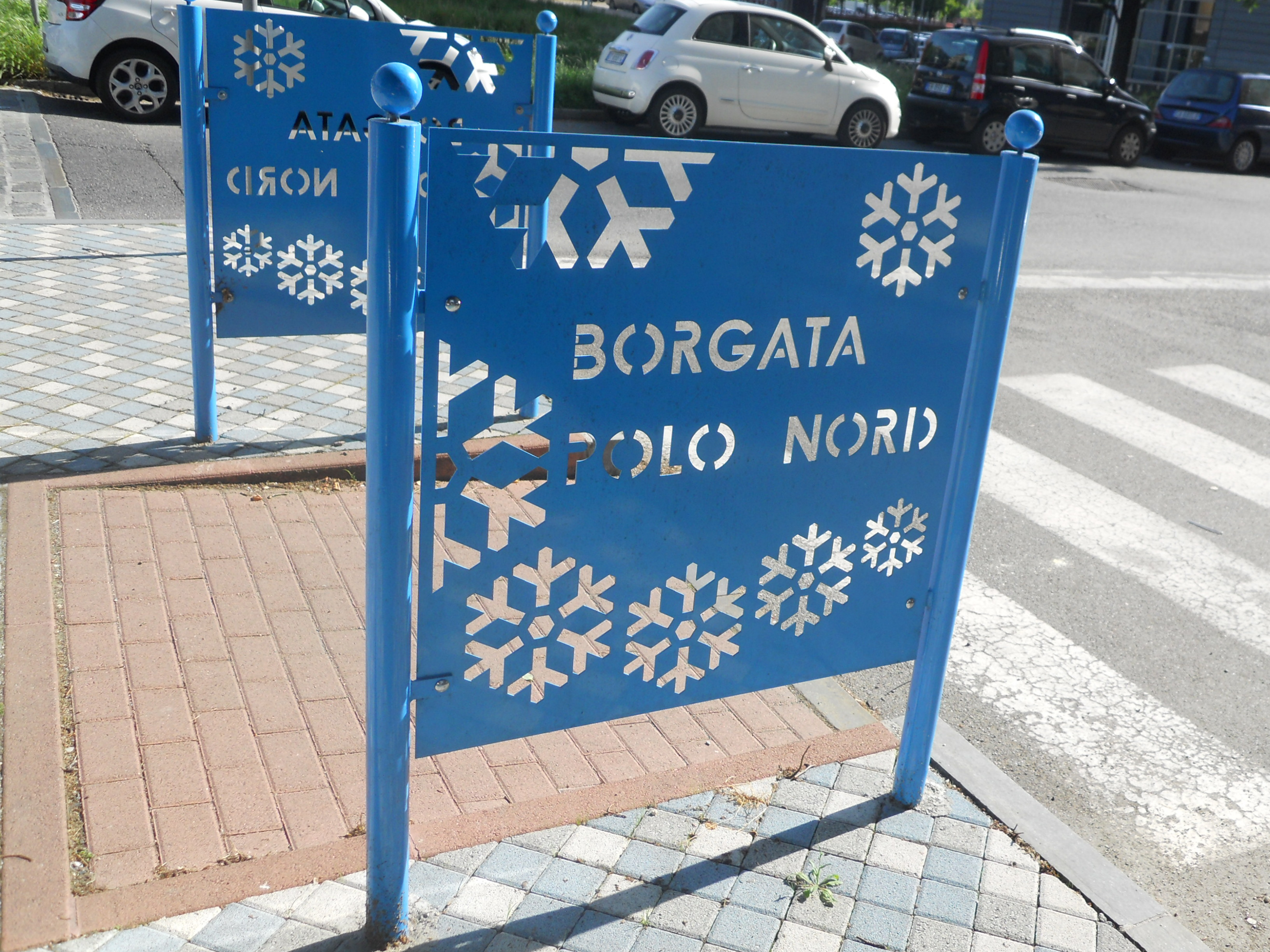 Cartello indicatore del rione Polo Nord